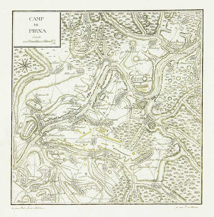 Саксонский военный лагерь под Пирной